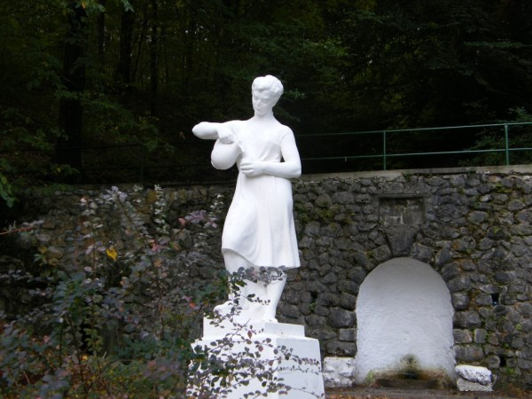 Herczeg Klára (Weiss Claire) szobrász- érem- és porcelánművész szobra Miskolc-Perecesen Vizet öntő nő címmel.